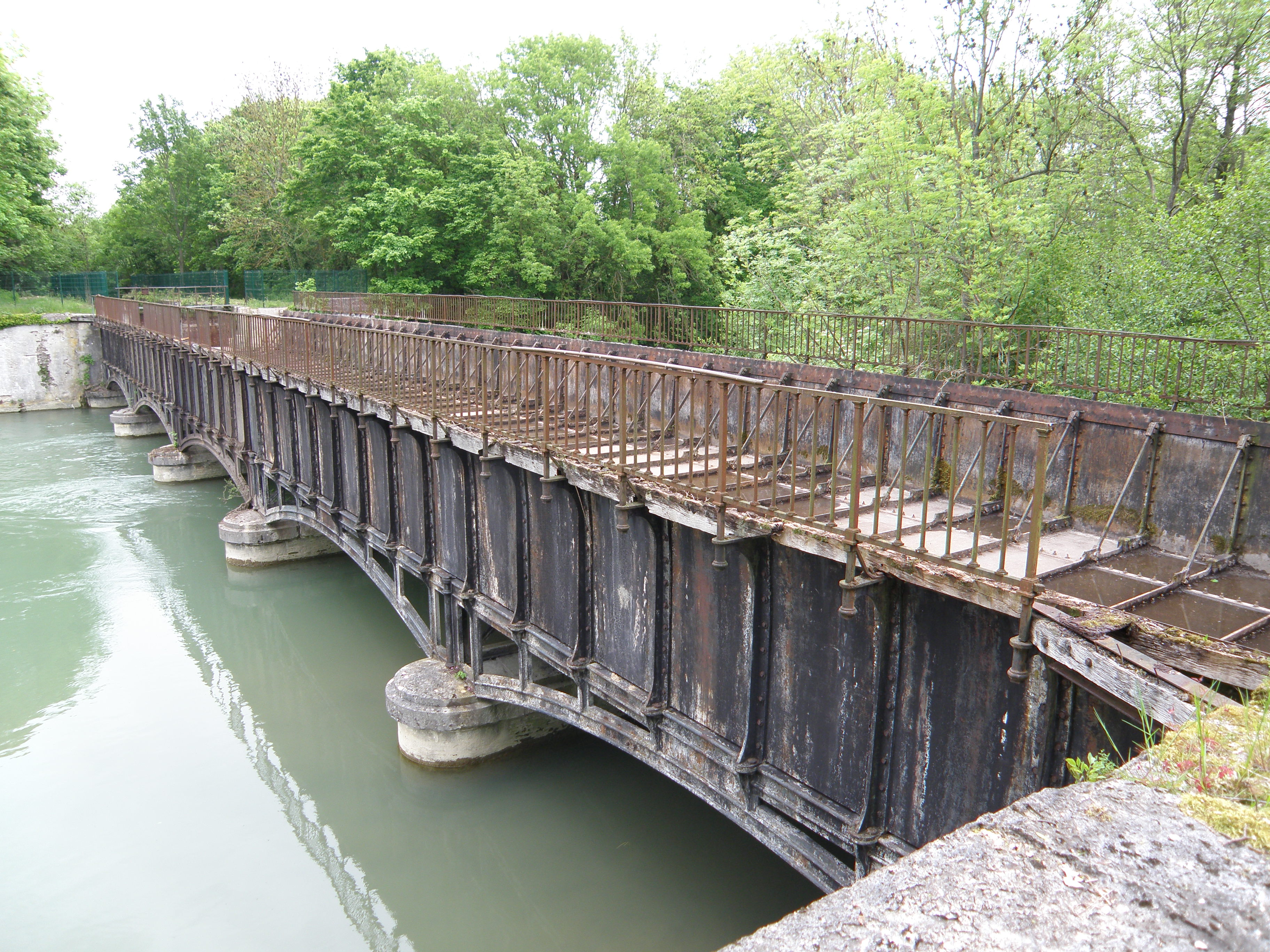 Pont-canal de Barberey-Saint-Sulpice Franchit la Seine. Porte le canal de la Haute Seine. 10600 Barberey-Saint-Sulpice